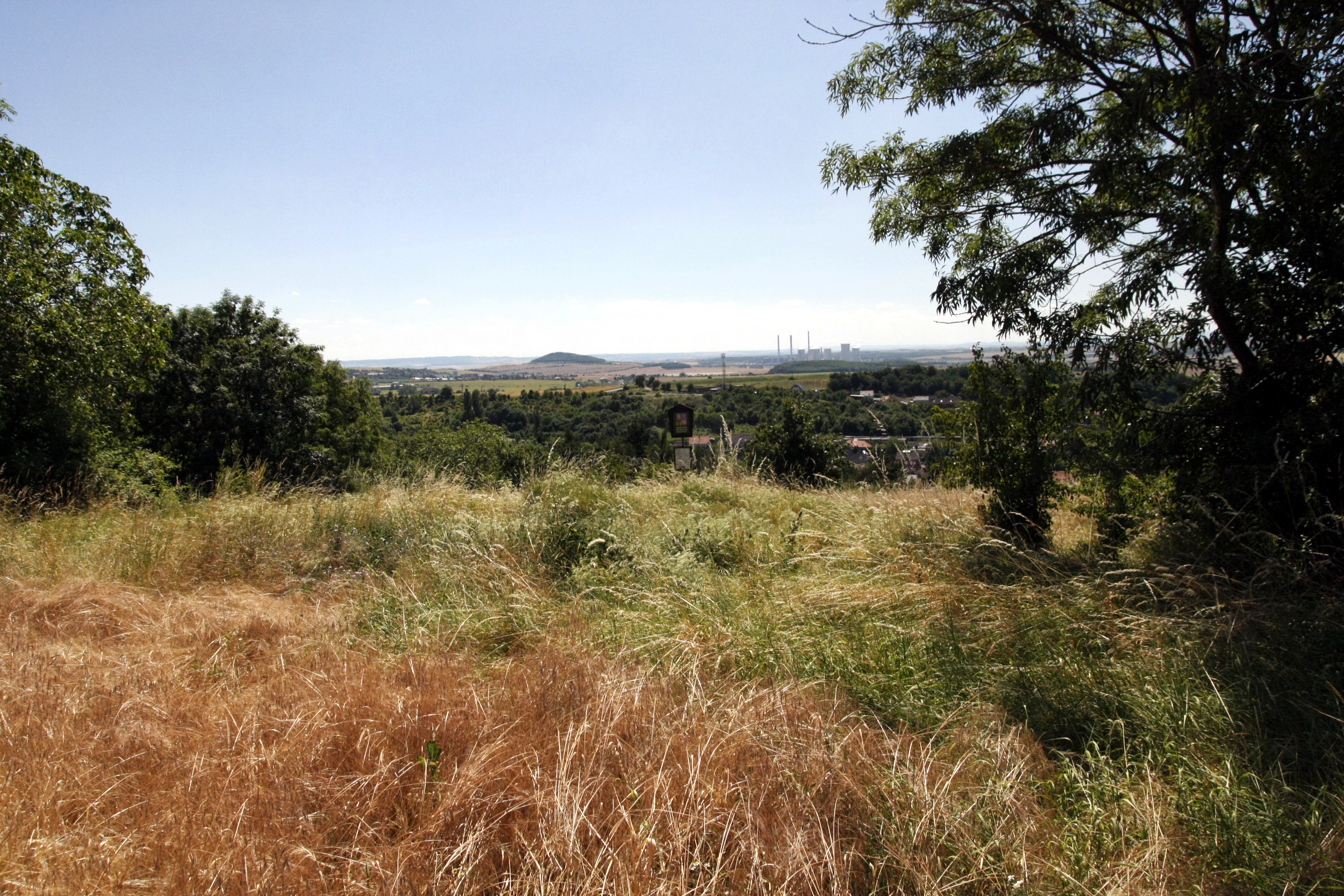 NPP Jánský vrch